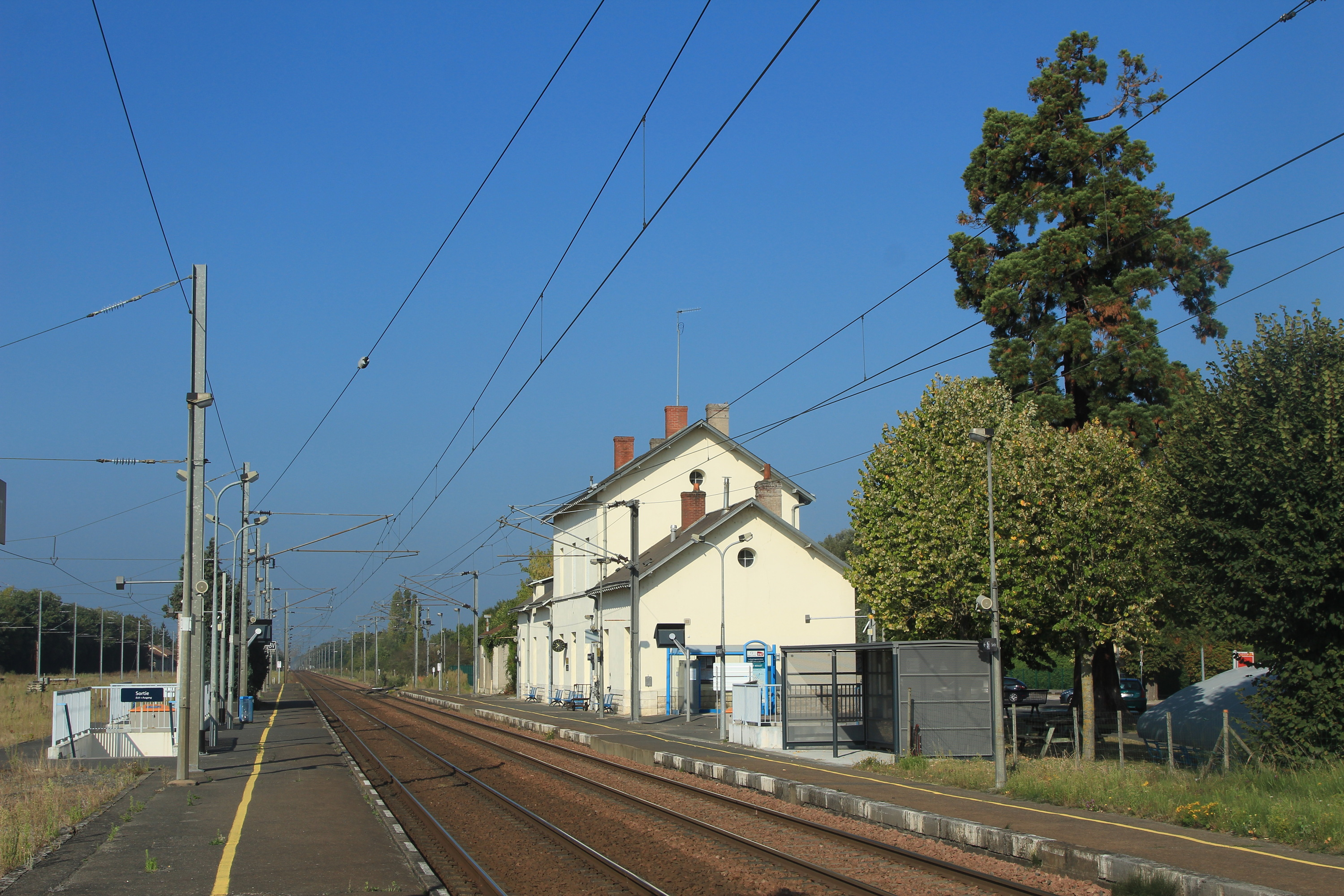 Vue générale de la gare de Port-Boulet, en direction de Saint-Nazaire.